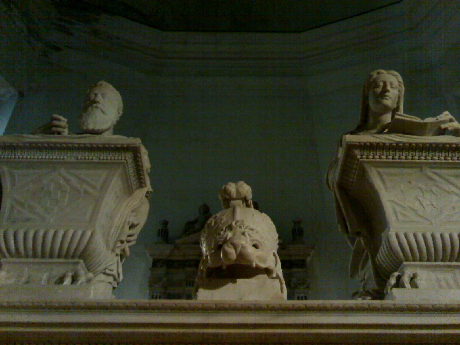 Sepolcro di Don Pedro de Toledo - Ponteficia Reale Basilica di san Giacomo degli Spagnoli (Napoli)